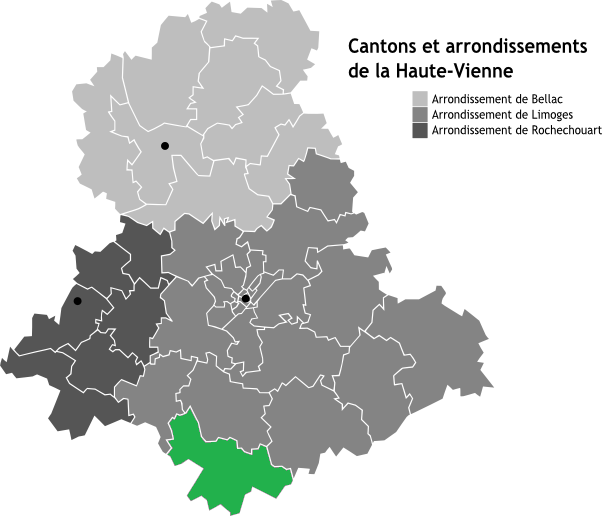 Canton de Saint-Yrieix-la-Perche, Limousin, France en Carte des arrondissements de la Haute-Vienne